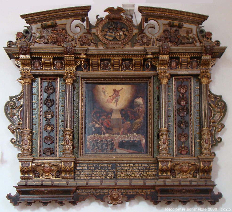 Epitaph für Bernolf von Gemmingen zu Bürg († 1609) und seine Gemahlin Anna von Grumbach in der Nikolauskirche in Neuenstadt am Kocher